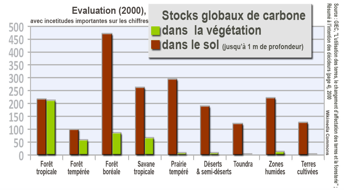 représentation grossière des taux de carbone stockés dans le sol et la flore (il s'agit de moyennes établies selon les données disponibles par le GIEC, mais il y a des incertitudes sur les chiffres et selon le type de sol et de forêt, des variations importantes peuvent exister; on voit que selon l'IPCC le stock de carbone est plus important dans les sols que dans les végétaux sur pieds